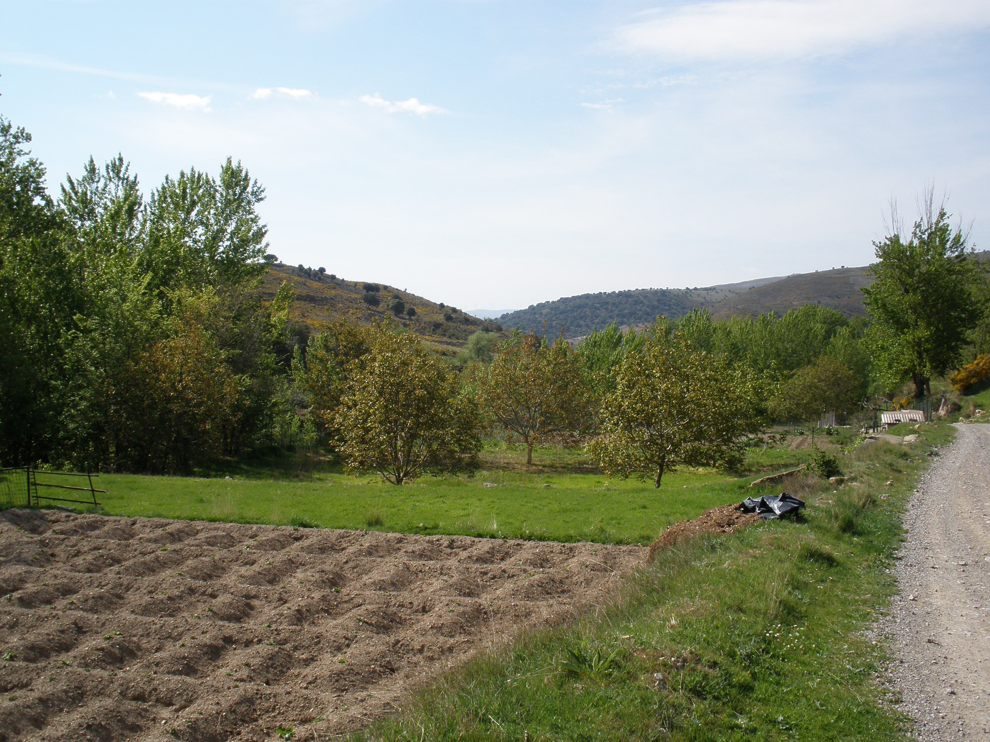 El regadío, en Muro de Aguas.